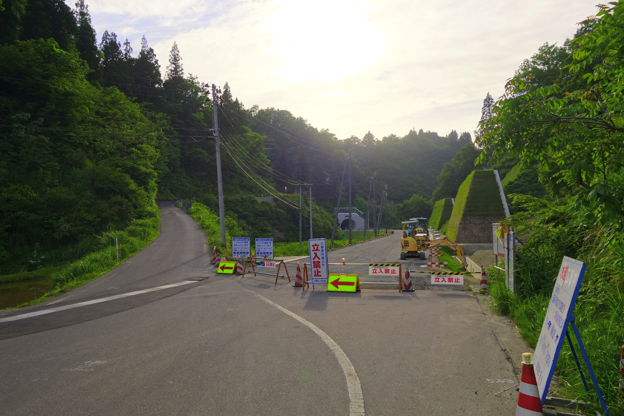 国道403号大白倉バイパス岩瀬トンネル工事の写真